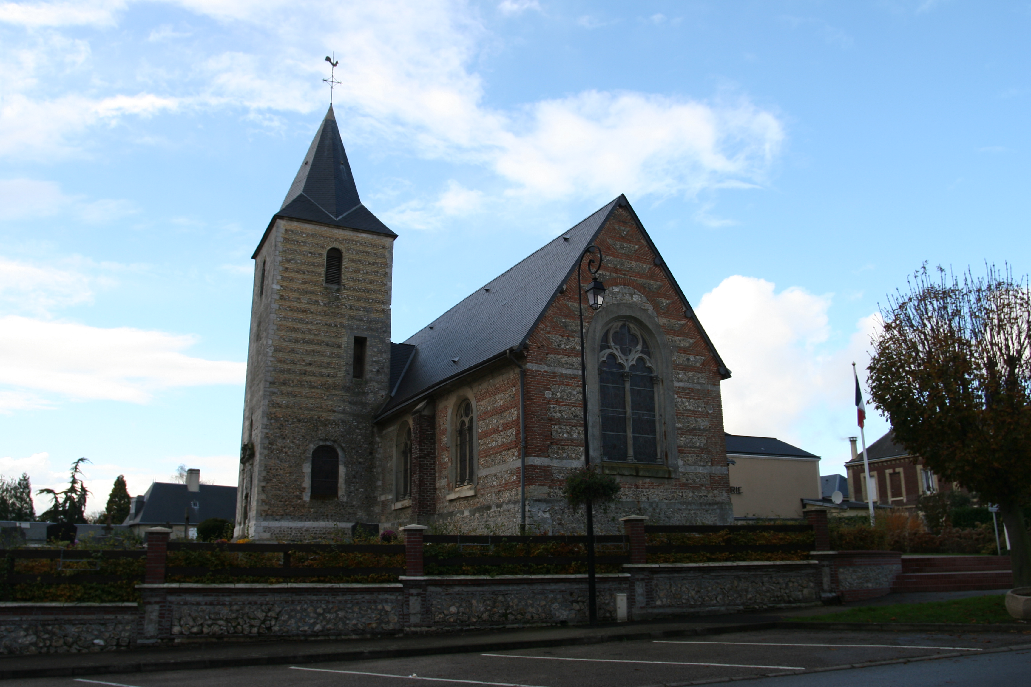 Église de Saint-Martin-du-Manoir.